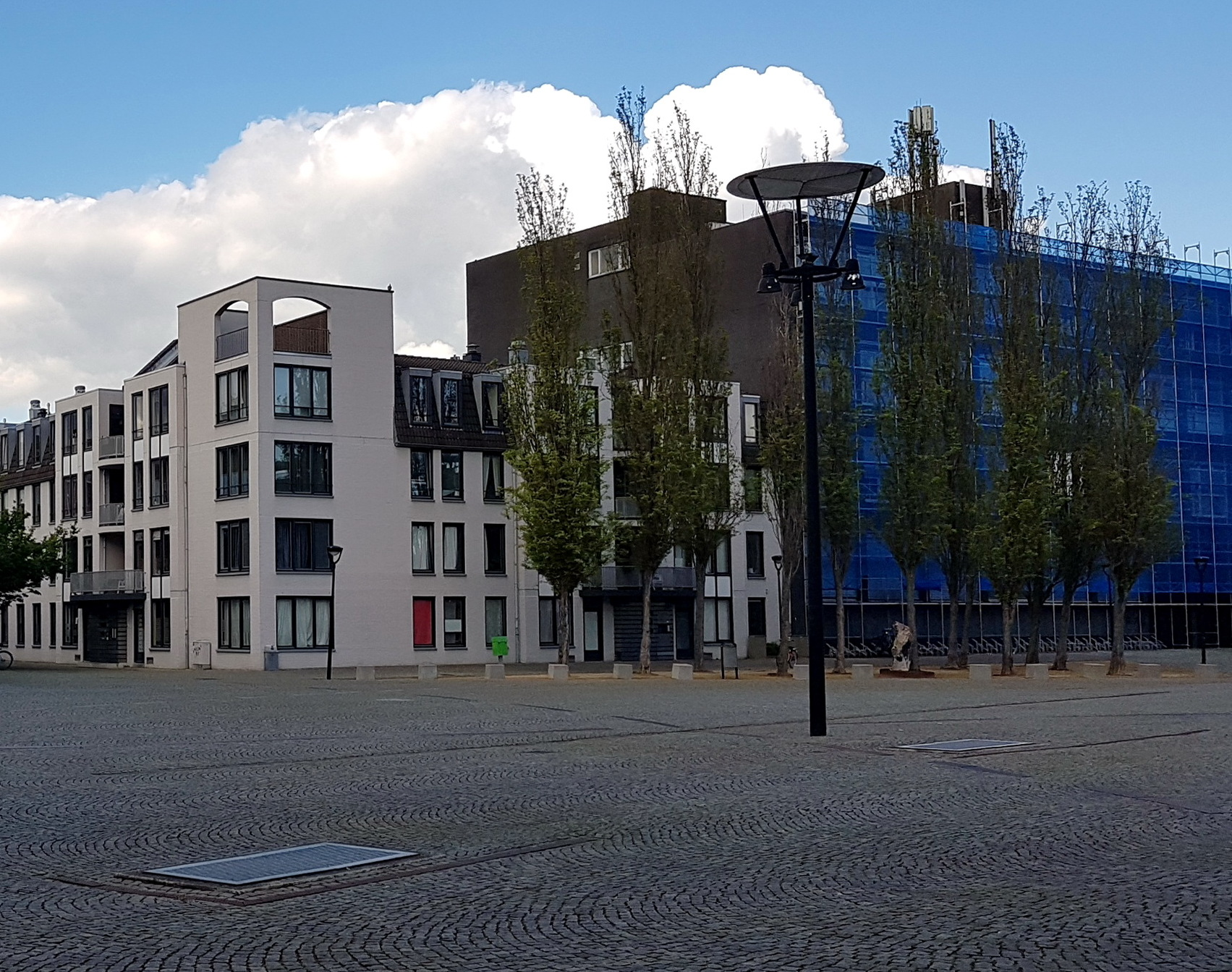 Zicht vanuit het zuidwesten op het Herdenkingsplein in het Kommelkwartier in het centrum van Maastricht. Het plein werd rond 1993 aangelegd op een voormalig fabrieksterrein achter de Brusselsestraat. De strepen van roestvrij staal, cortenstaal en beton werden ontworpen door Erick van Egeraath van het Delftse architectenbureau Mecanoo.